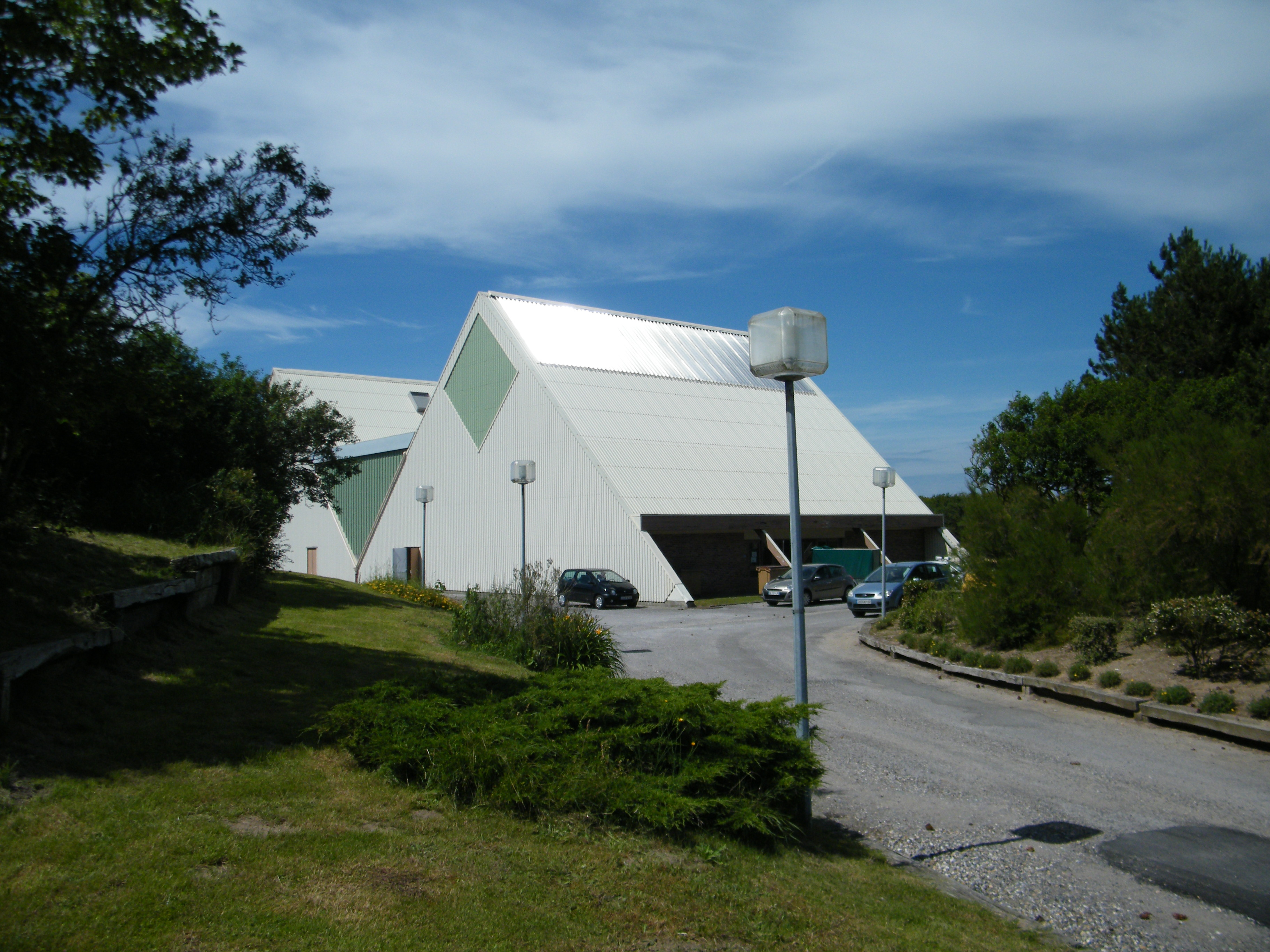 Fort-Mahon-salle communale.